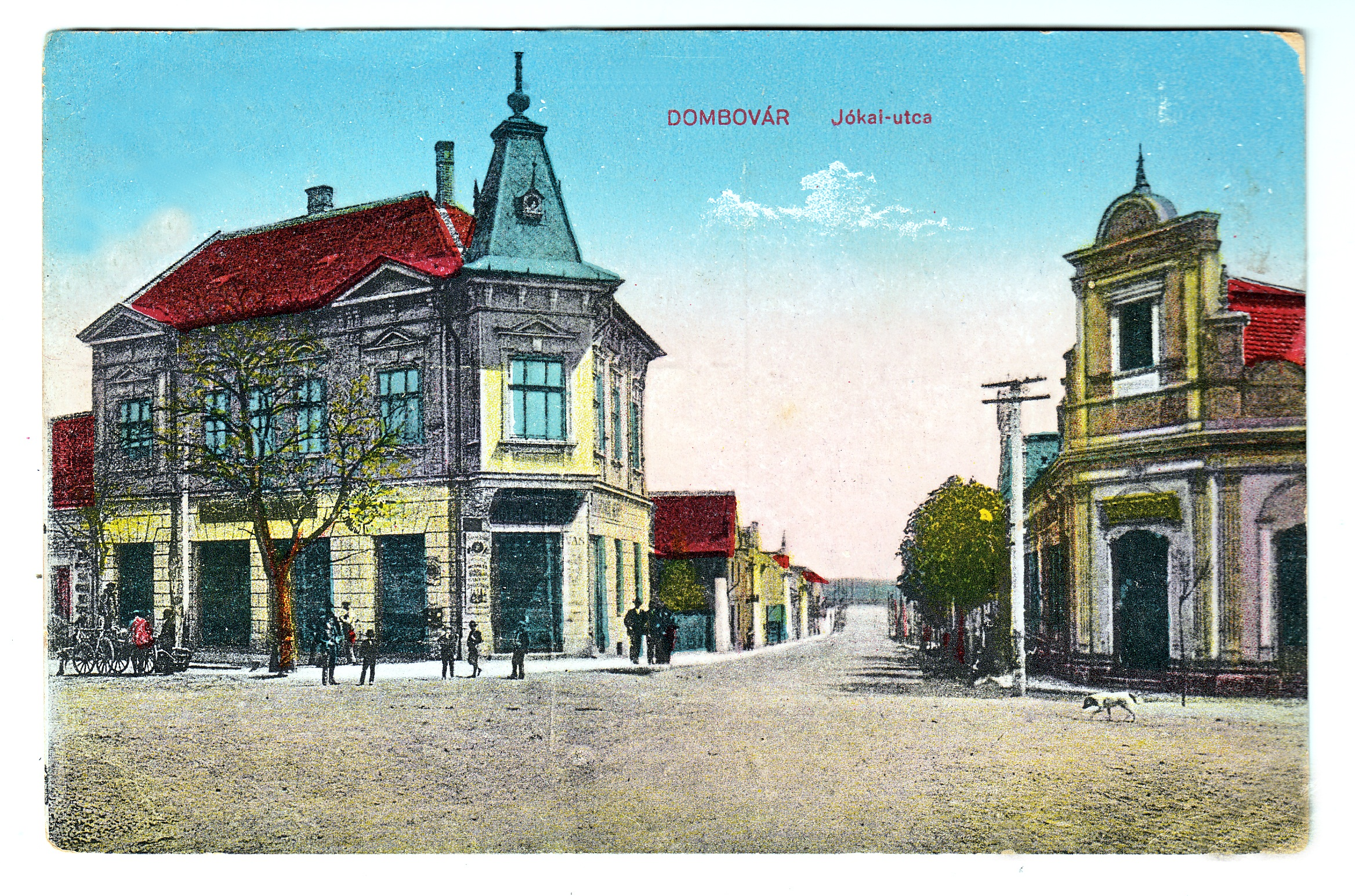 A dombóvári Jókai utca régi képeslapon